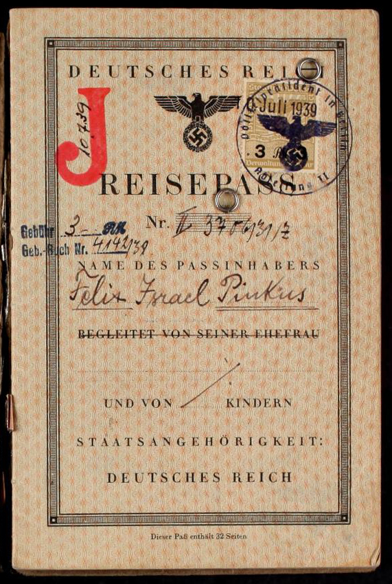 Reisepass mit Judenstempel